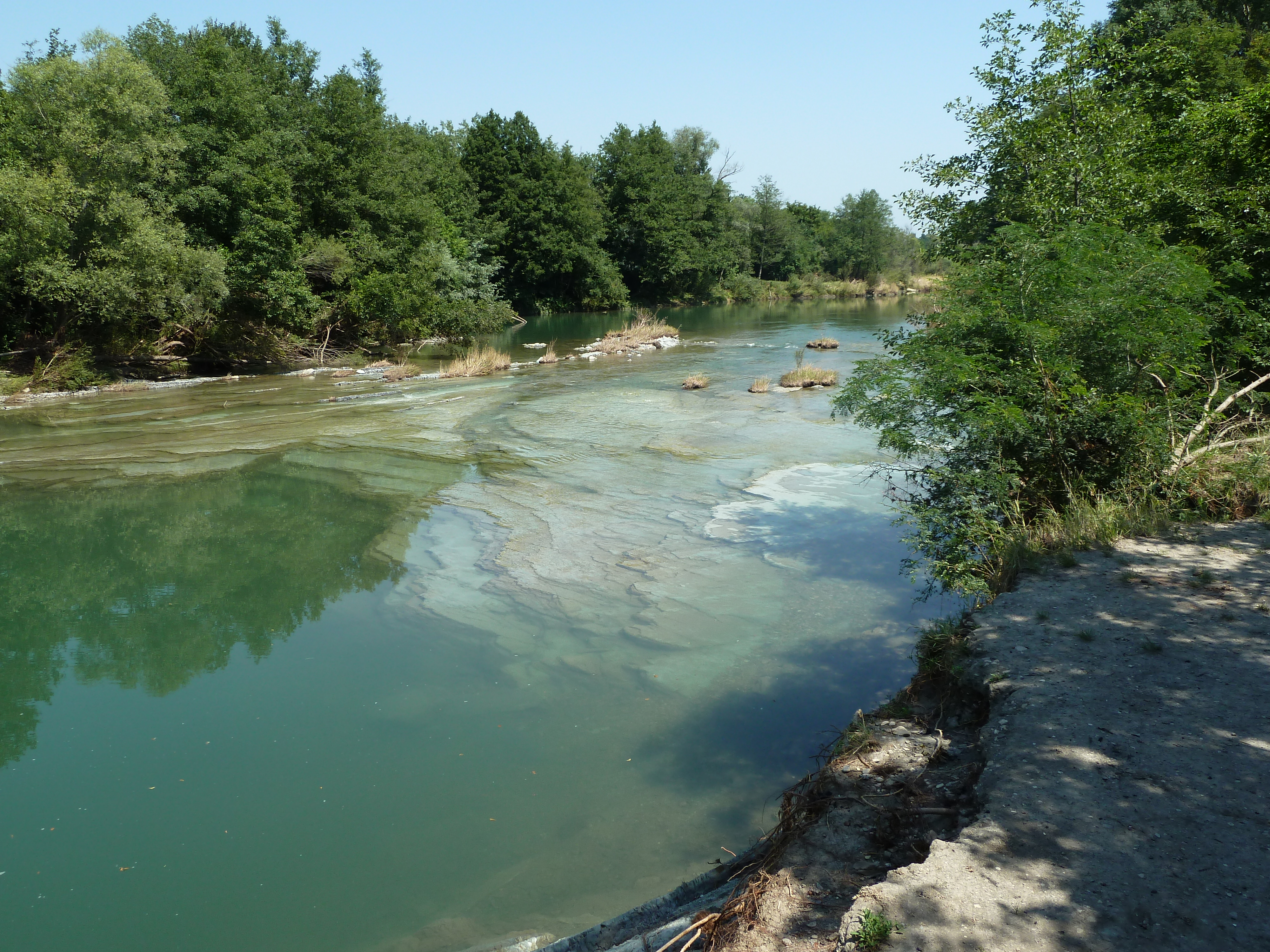 Река Абин выше Абинска